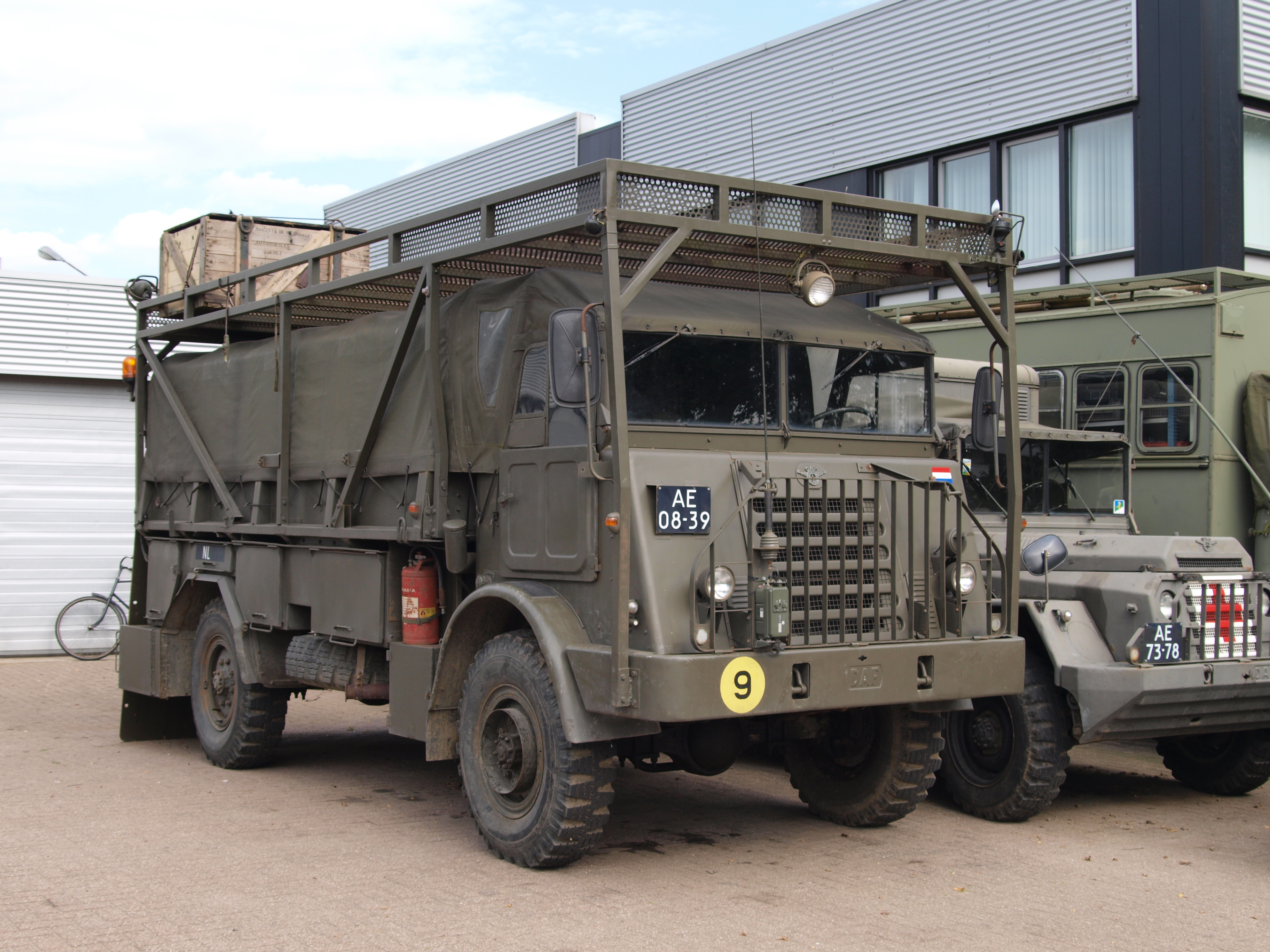 DAF YA 314